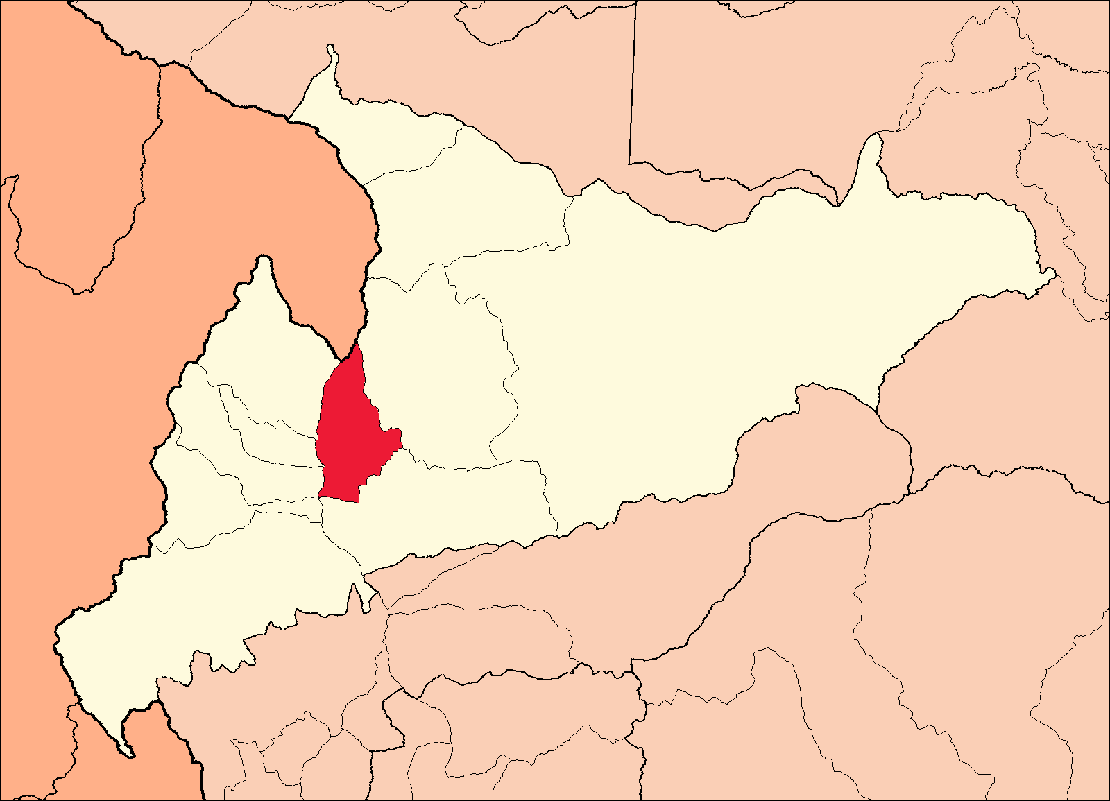 Área del distrito de Chavín de Pariarca dentro de la provincia de Huamalíes.